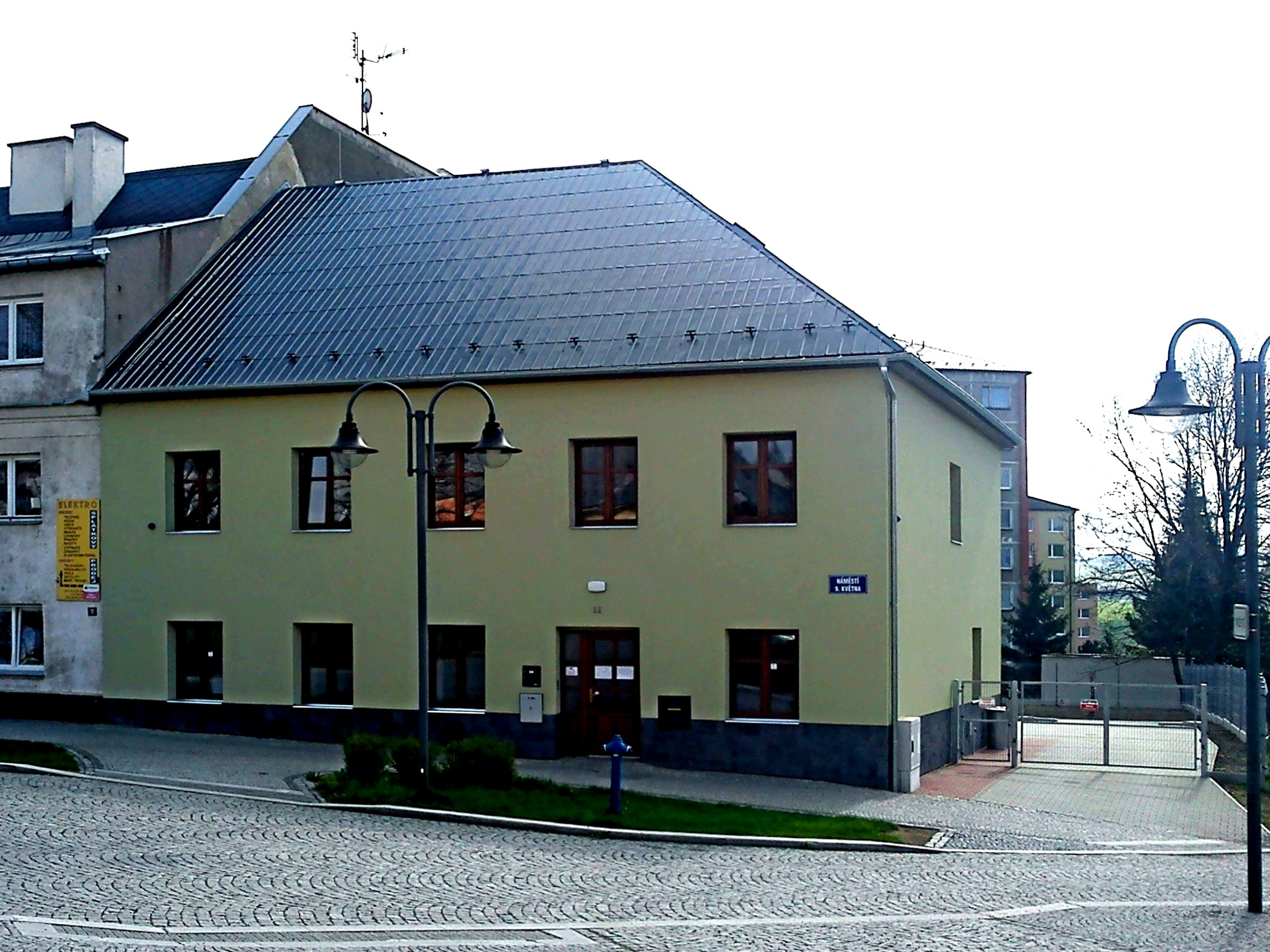 Rodiště Fr. Hanela